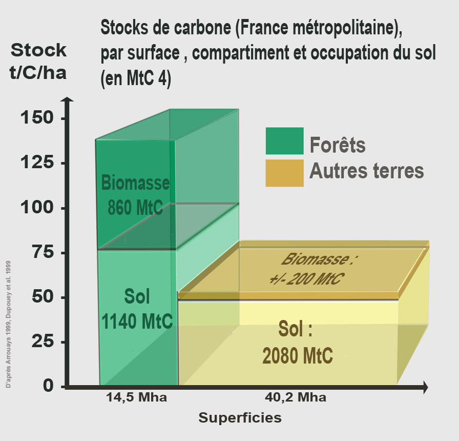 D'après Arrouays 1999, Dupouey et al. 1999 Stocks de carbone dans le sol et en forêt, dont par la biomasse, (en MtC = mégatonne de carbone, = million de tonne de carbone)